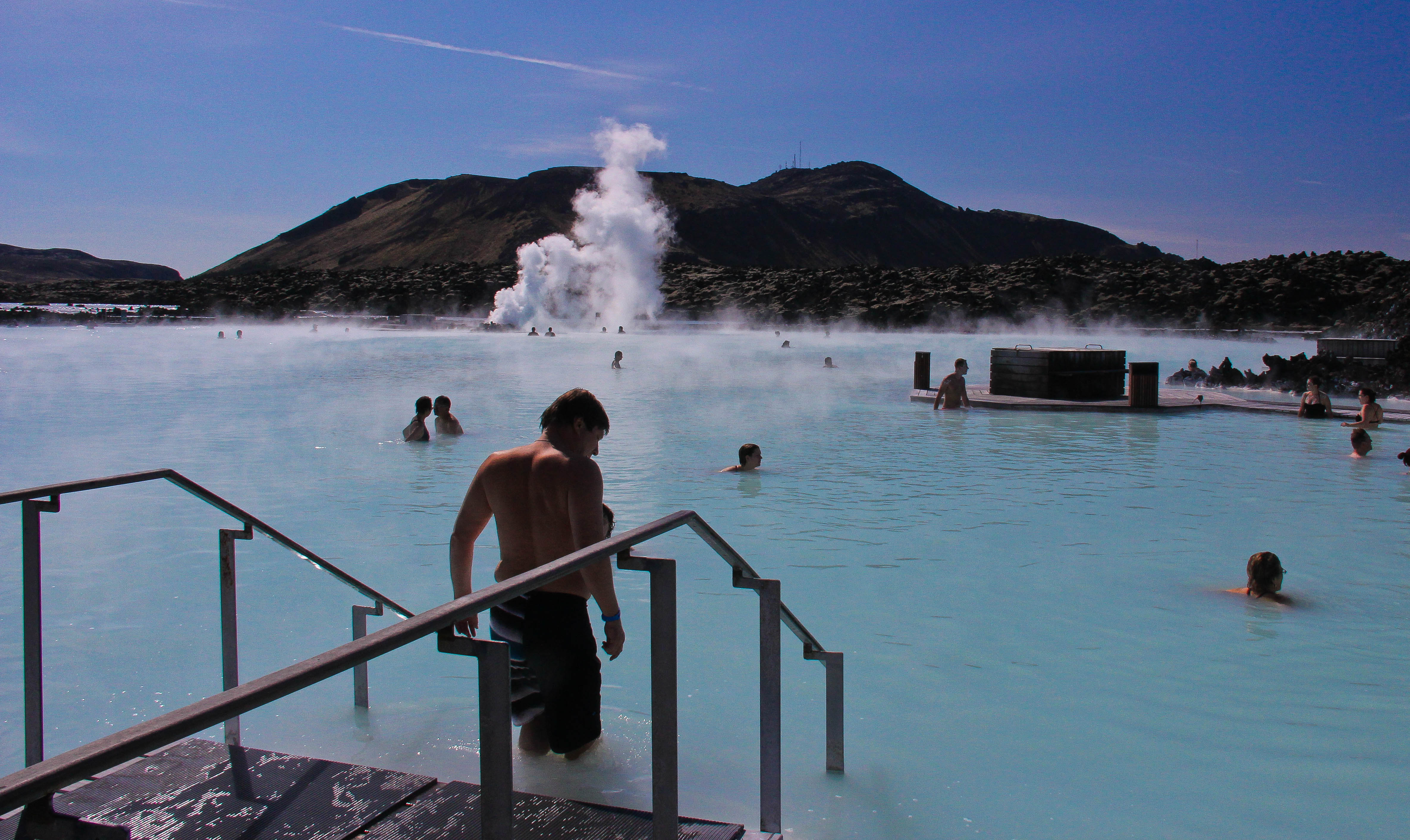 Blue Lagoon, Iceland